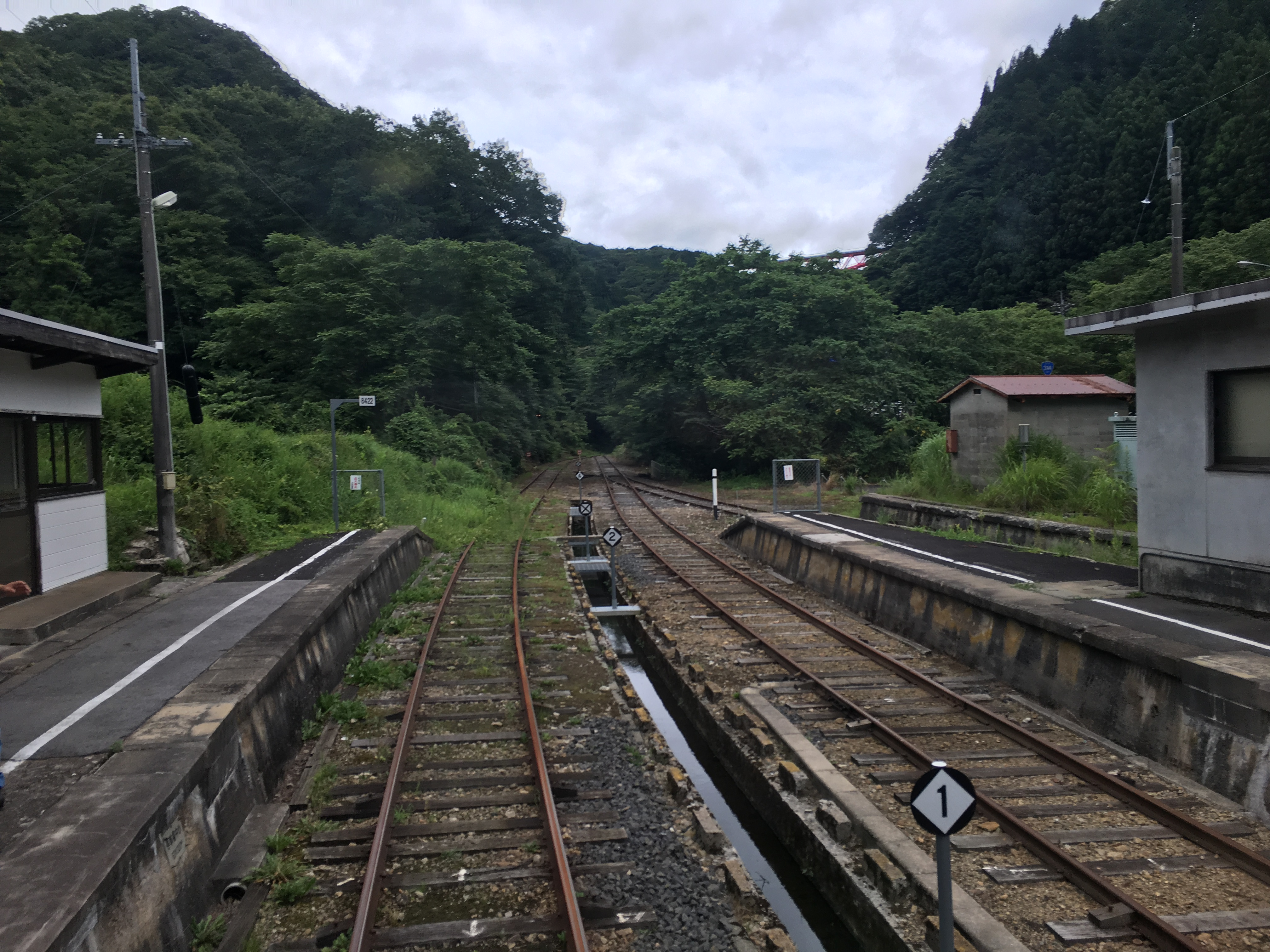 出雲坂根駅 (izumo-Sakane Station)